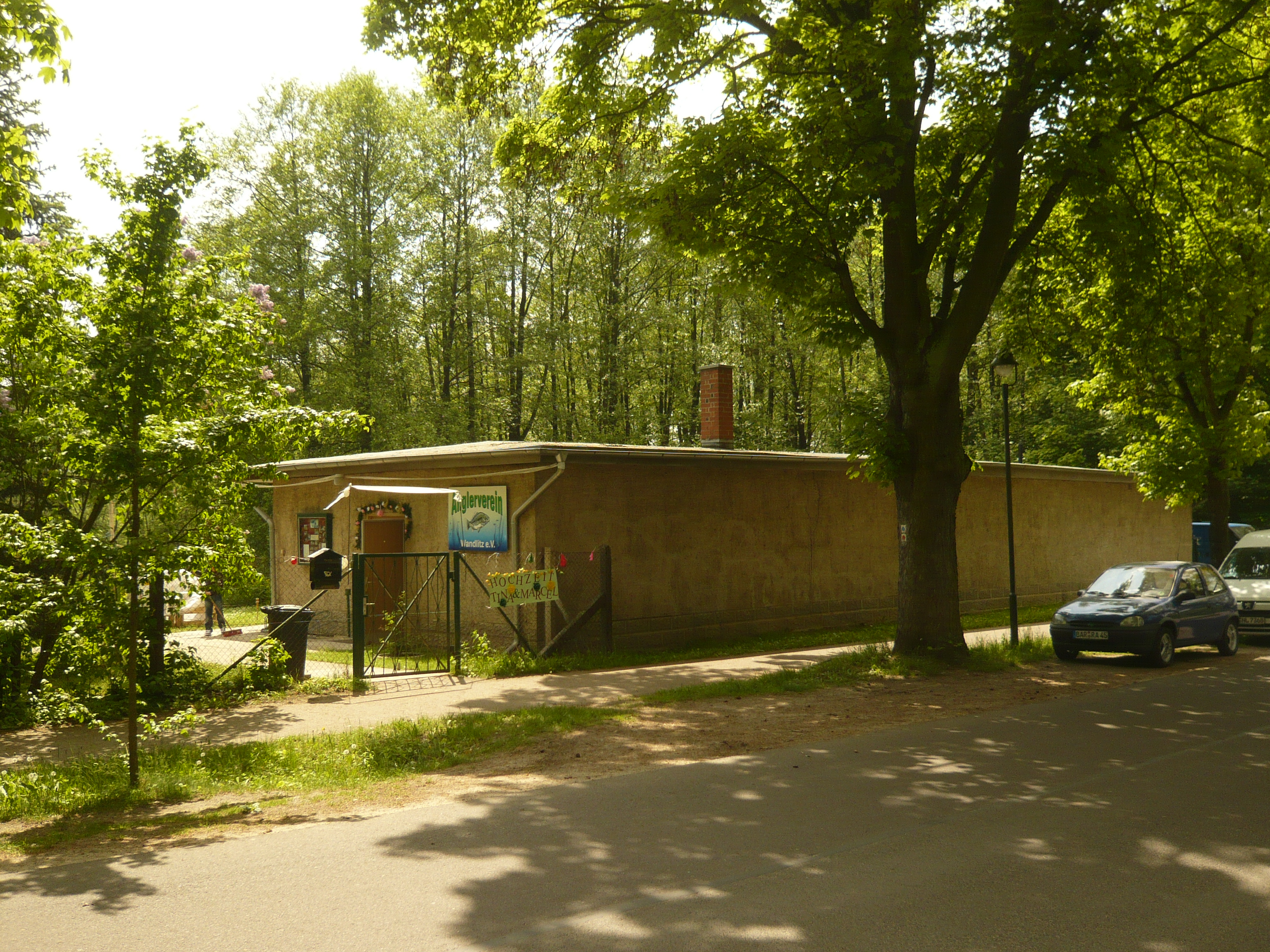 Gemeinde Wandlitz, Ortsteil Wandlitzsee: Anglerheim